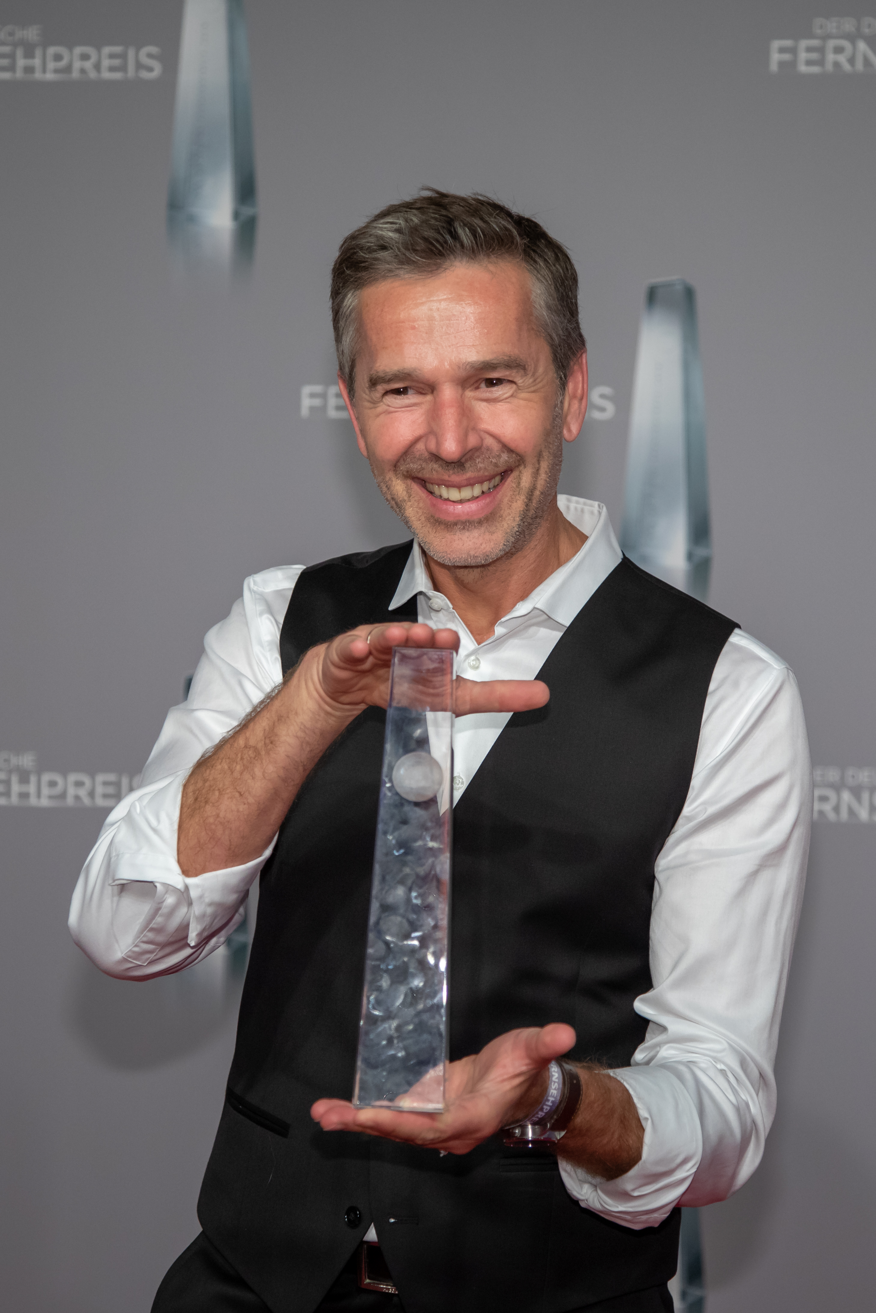 Dirk Steffens beim Deutschen Fernsehpreis 2019 in der Düsseldorfer Rheinterrasse